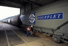 Transport du groupe Soufflet évoquant le négoce